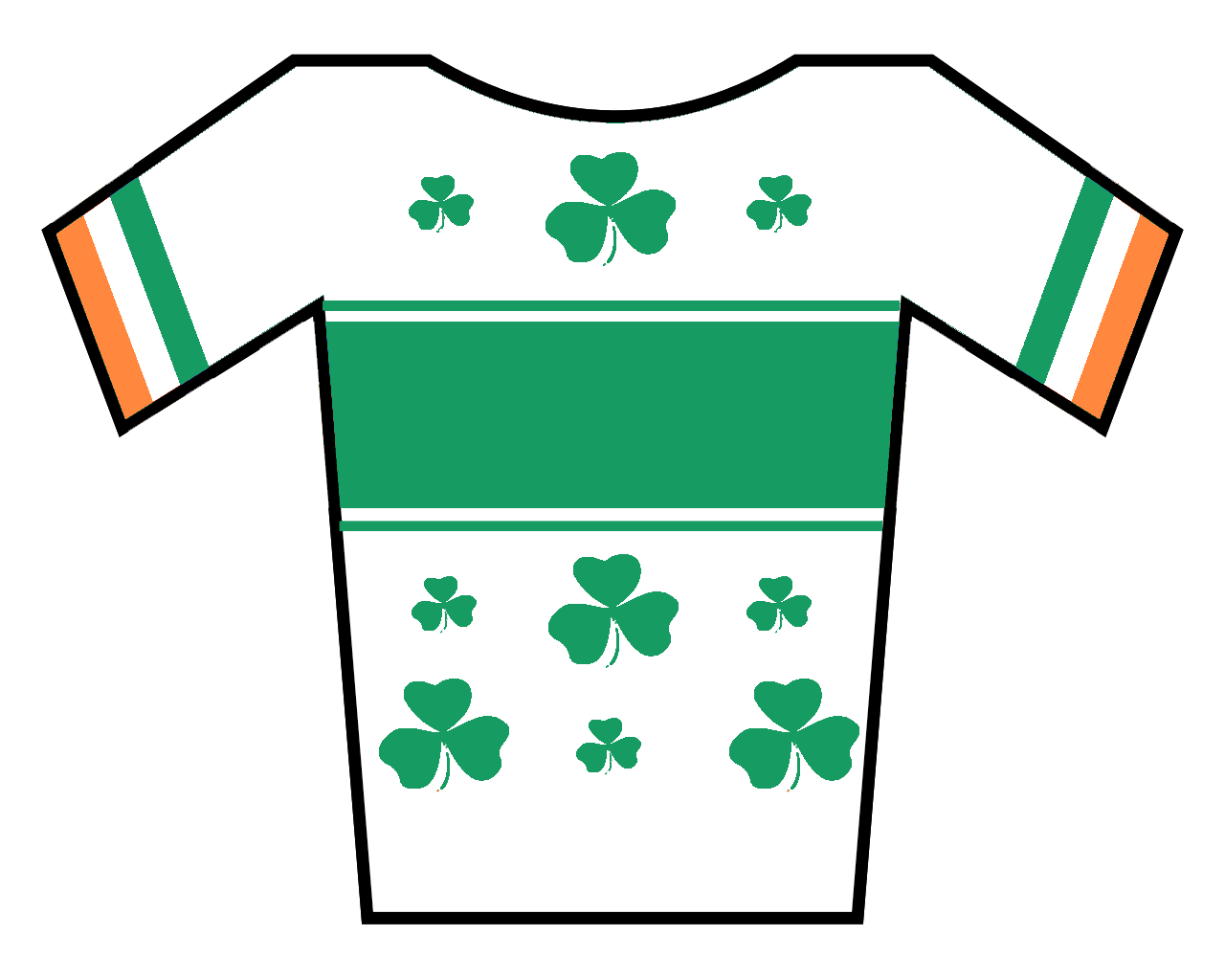 Maillot de Irlanda